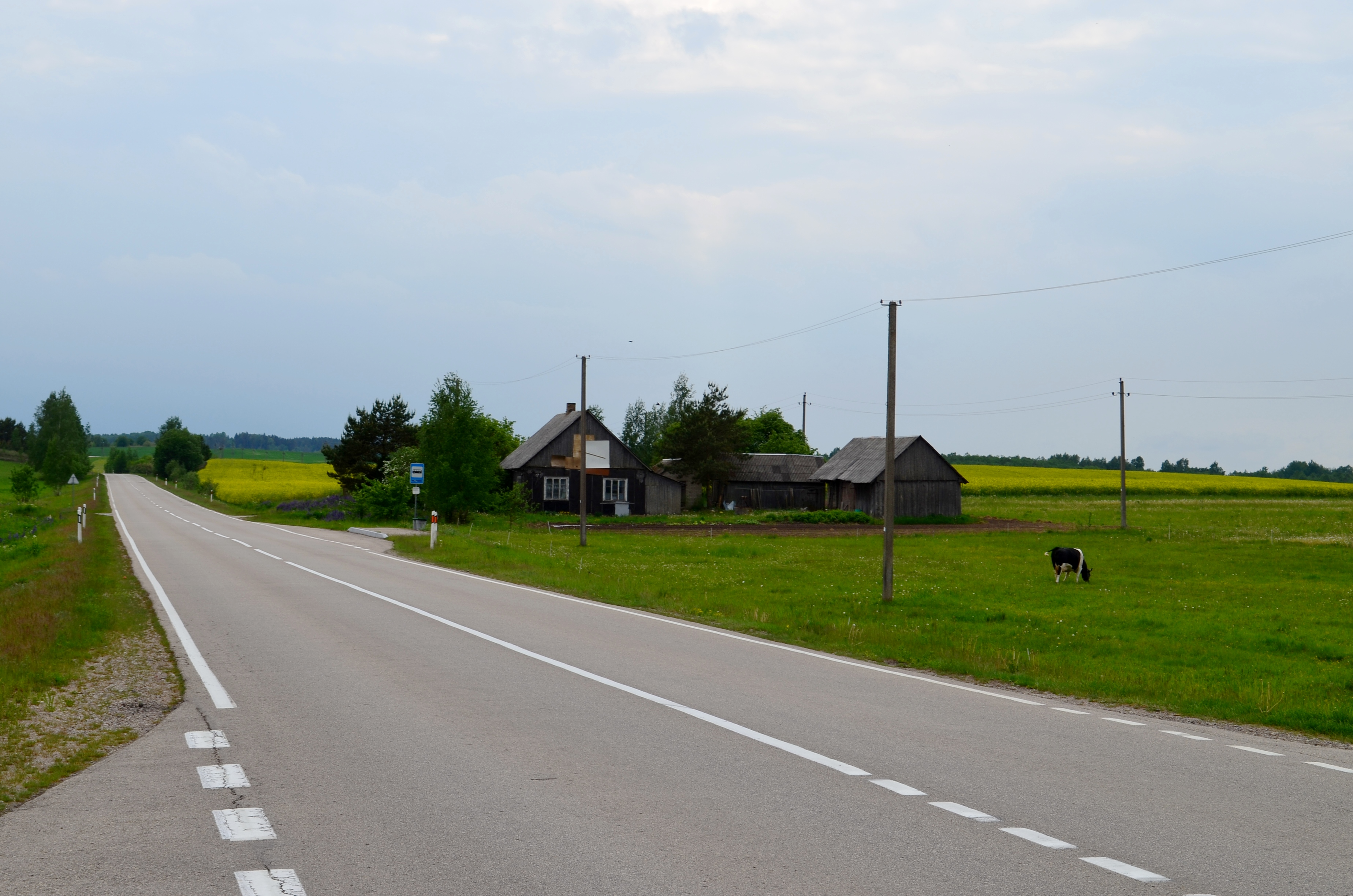 Tendžiogala, Raseinių r.